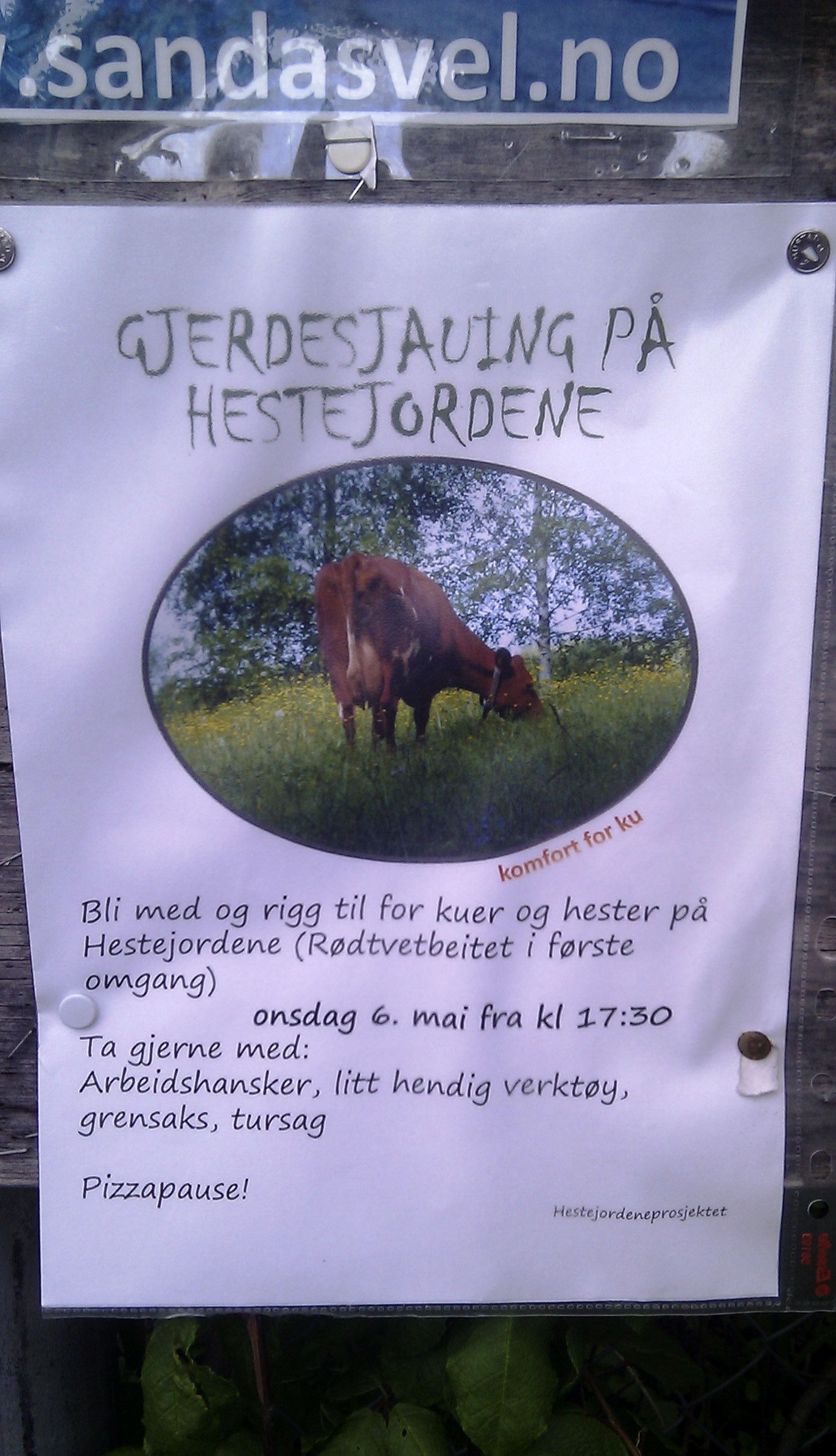 Oppslag om skjøtsel av Hestejordene, våren 2015. Sandås/Rødtvet, Oslo.